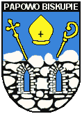 Herb wsi i gminy Papowo Biskupie.